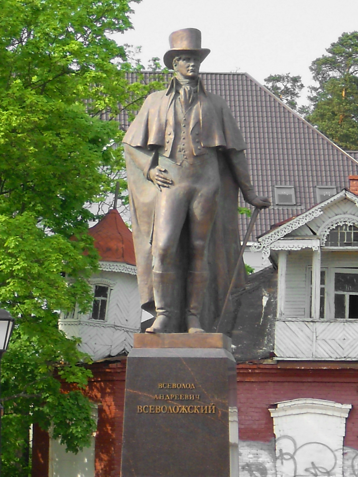 Памятник В. А. Всеволожскому, открытый в 2009 году на пересечении Всеволожского и Октябрьского проспектов. В 1892 году его внук — Павел Александрович Всеволожский основал город Всеволожск.